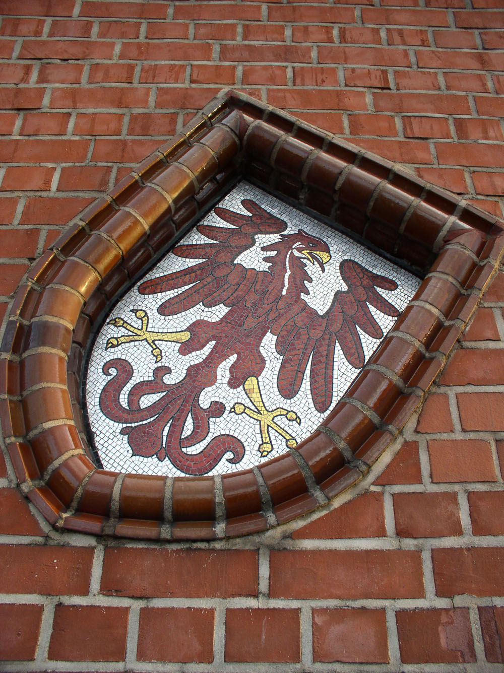 mosaic at Oberbaumbrücke, Berlin